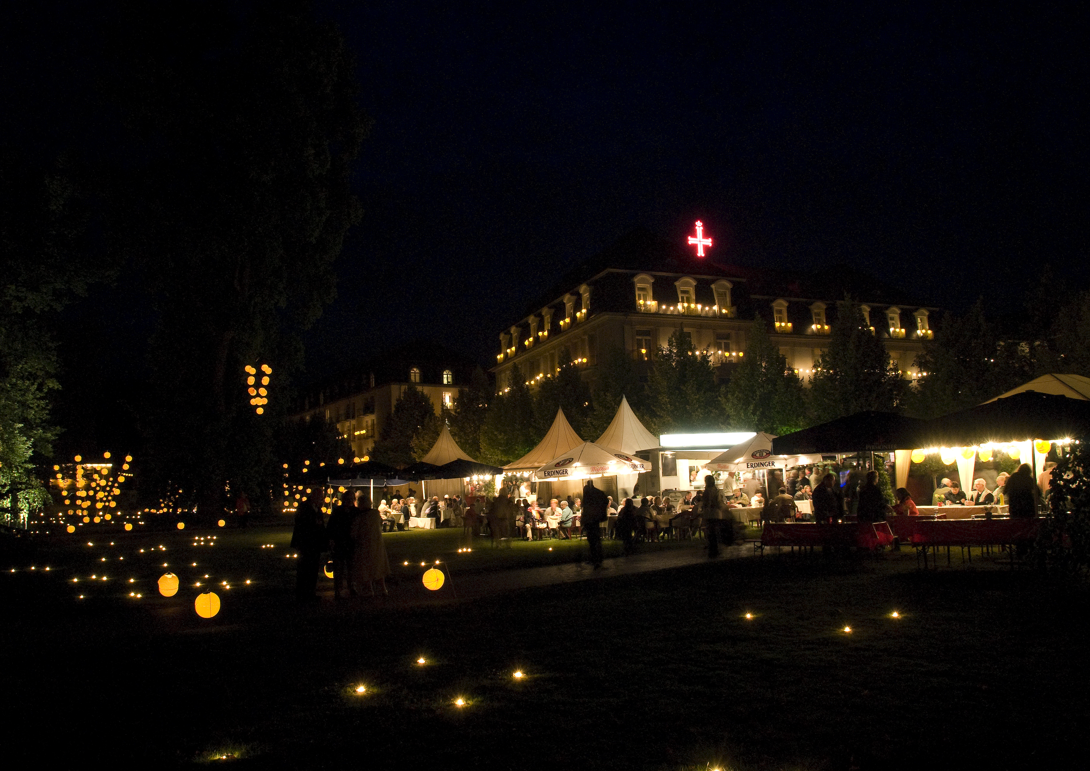 Die Veranstaltung "Goldener Sonntag" markiert das Ende der Open Air Veranstaltungssaison in Bad Pyrmont mit Höhenfeuerwerk